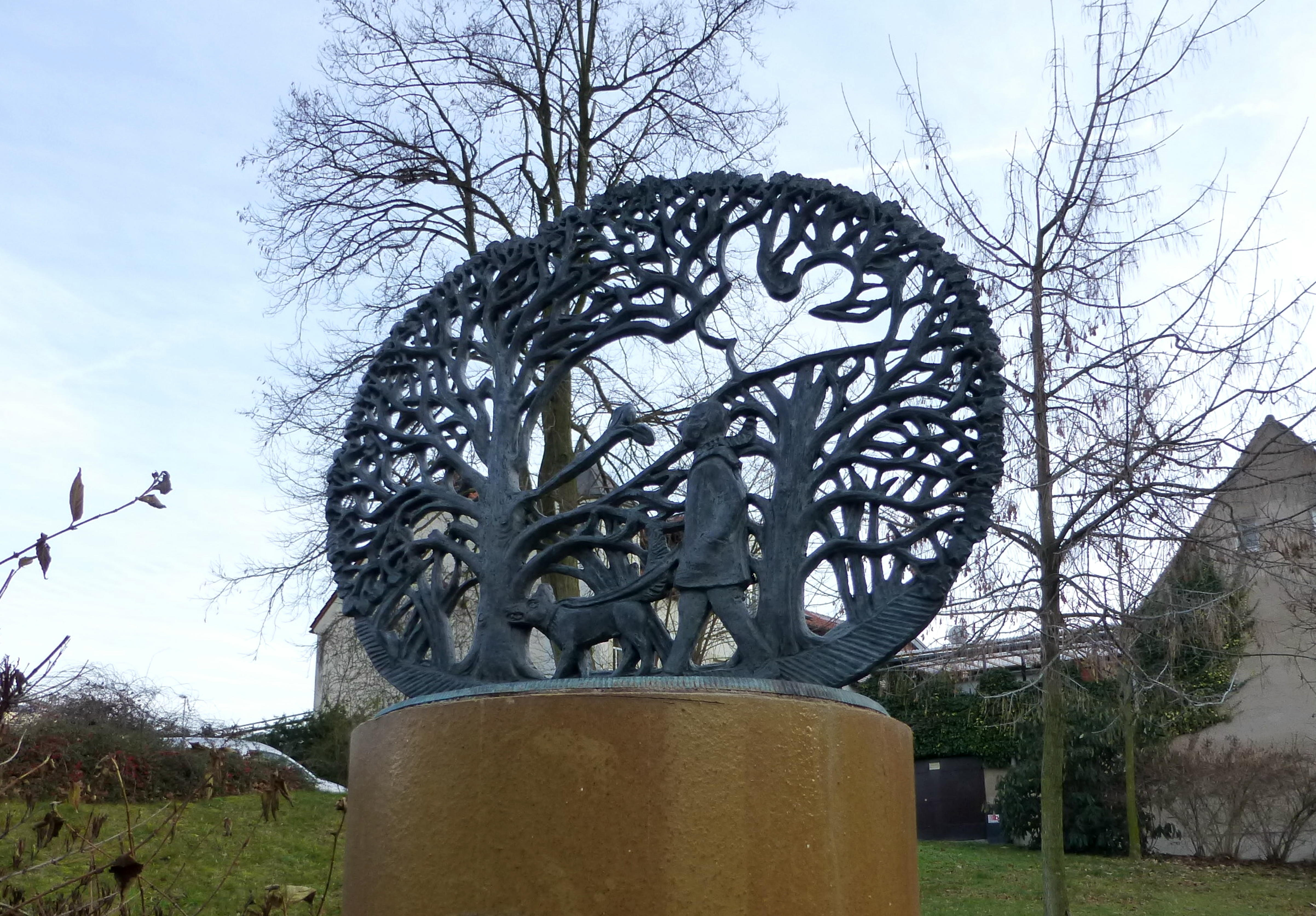 Der Wanderer (Eva Backofen)